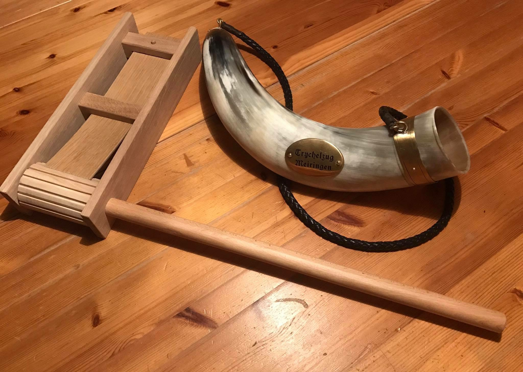 Rälle und Horn